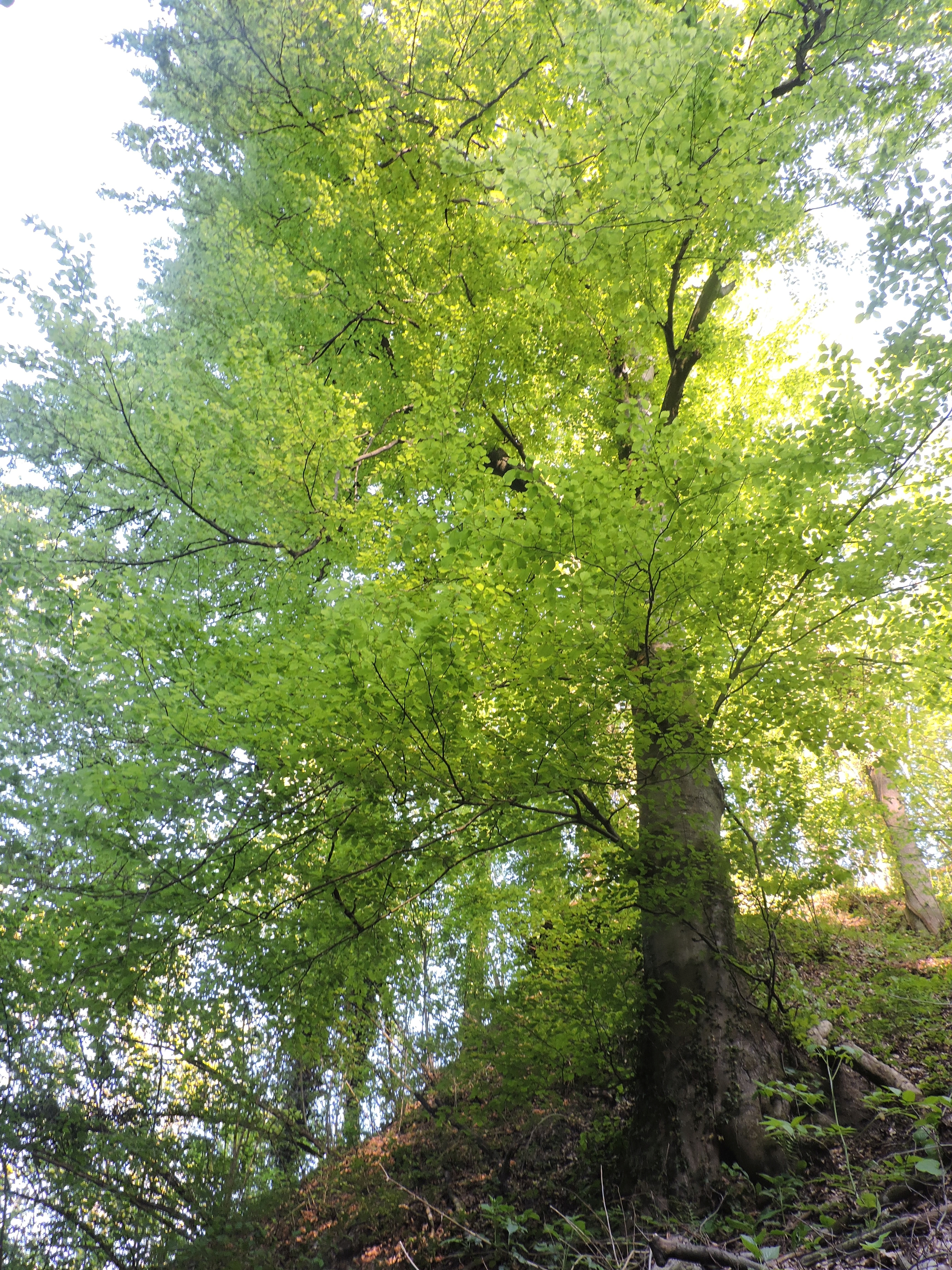 parco naturale di Rocchetta Tanaro (Q3895649)